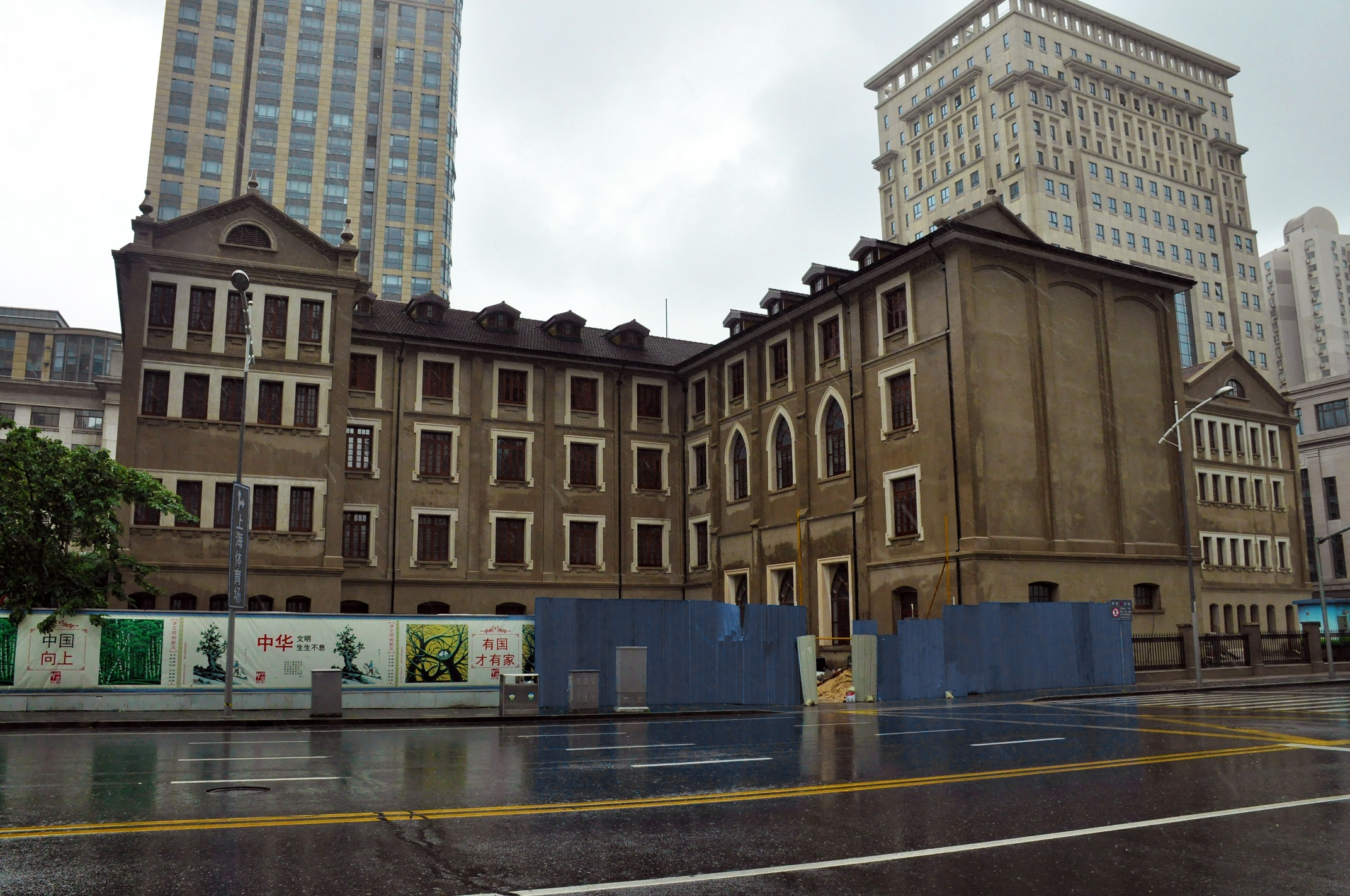 天主教大修院 大修道院 漕溪北路336号 1928年